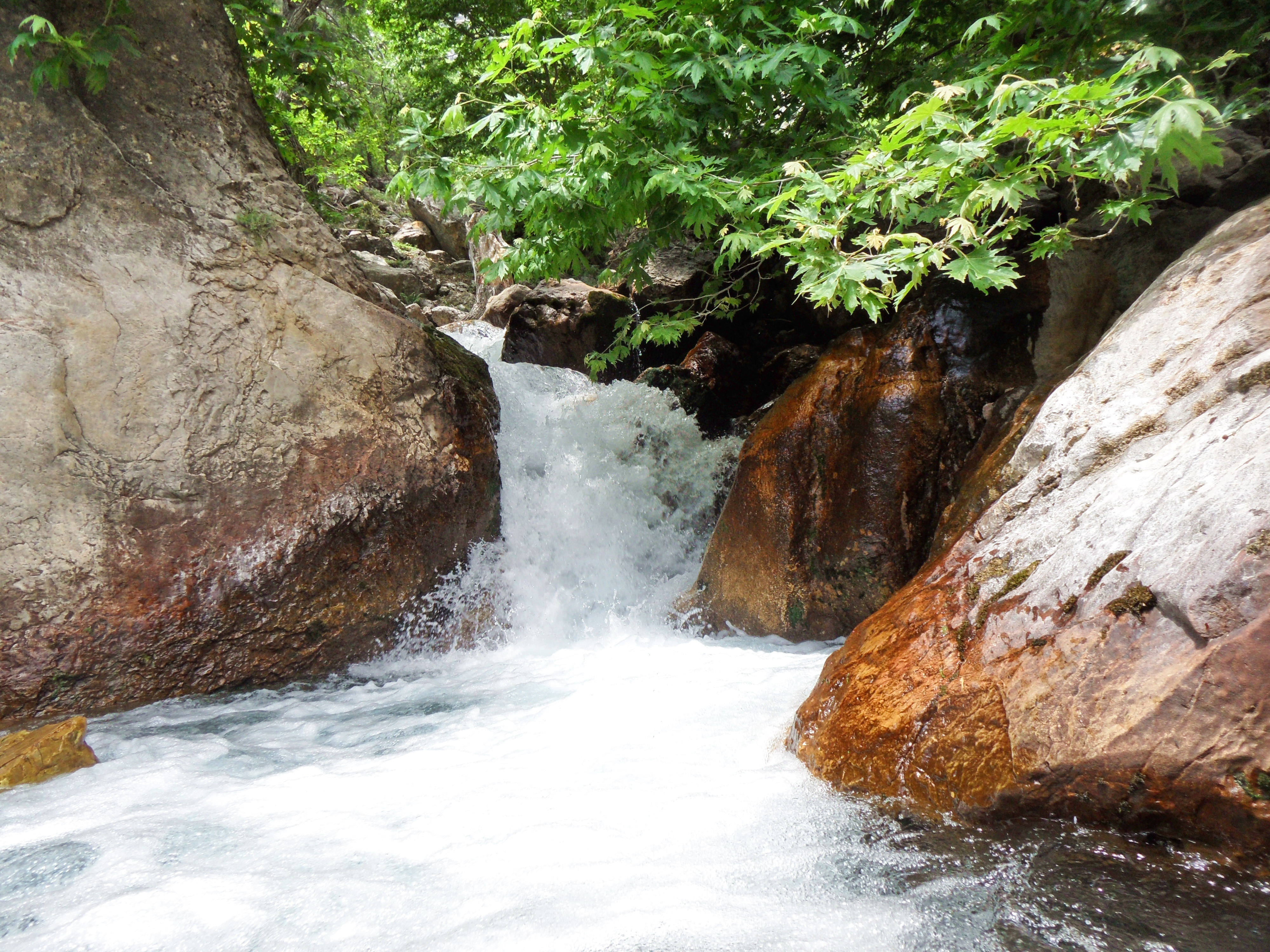 Dragon cayi Su gözü